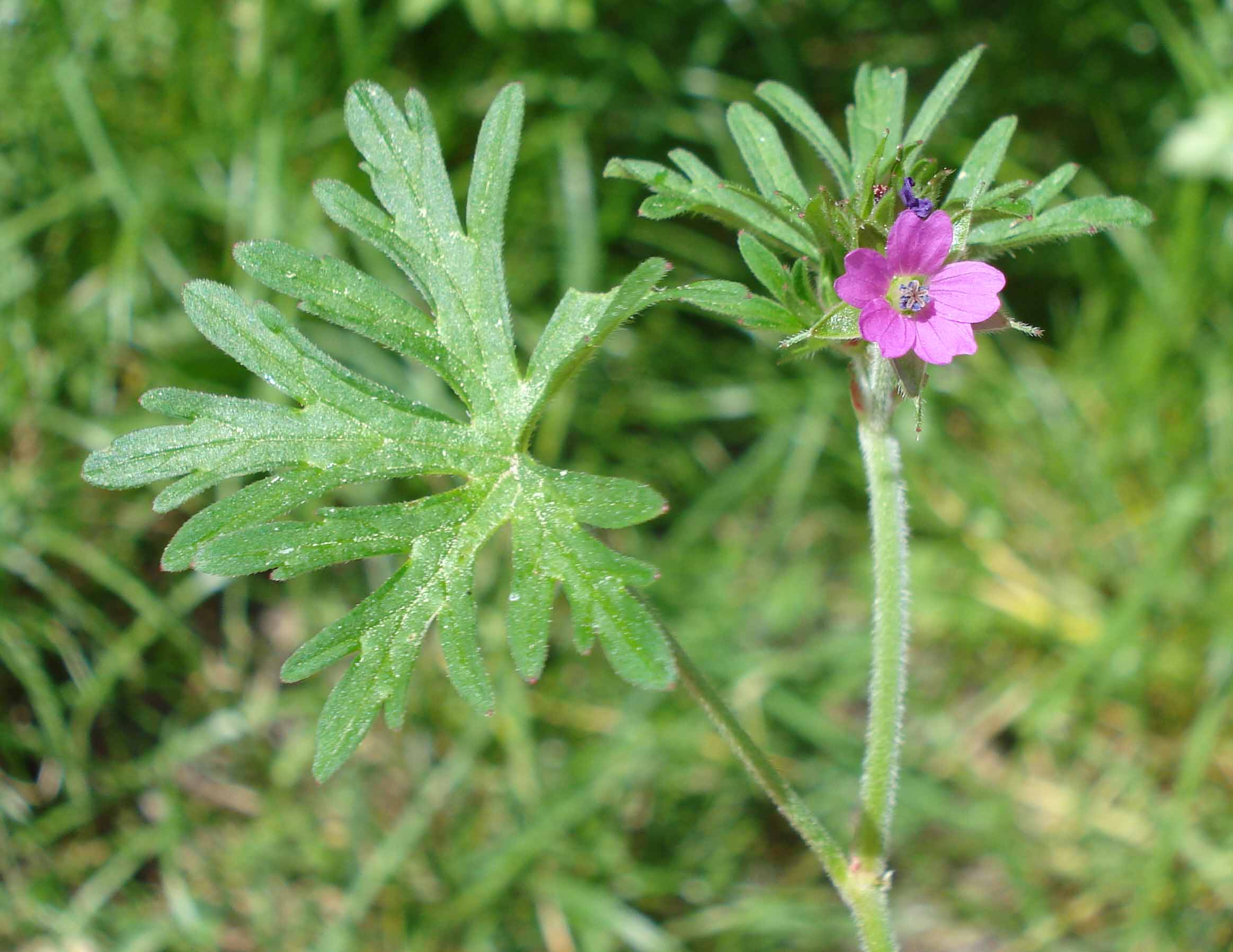 Geranium dissectum (Unterfranken, Germany)